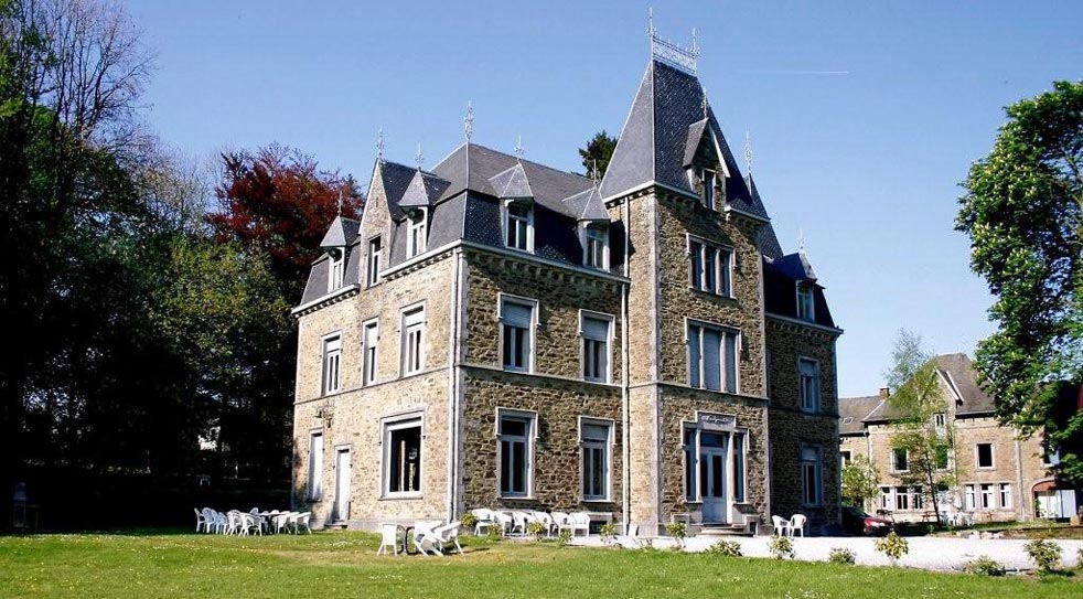 Le Château de Porcheresse